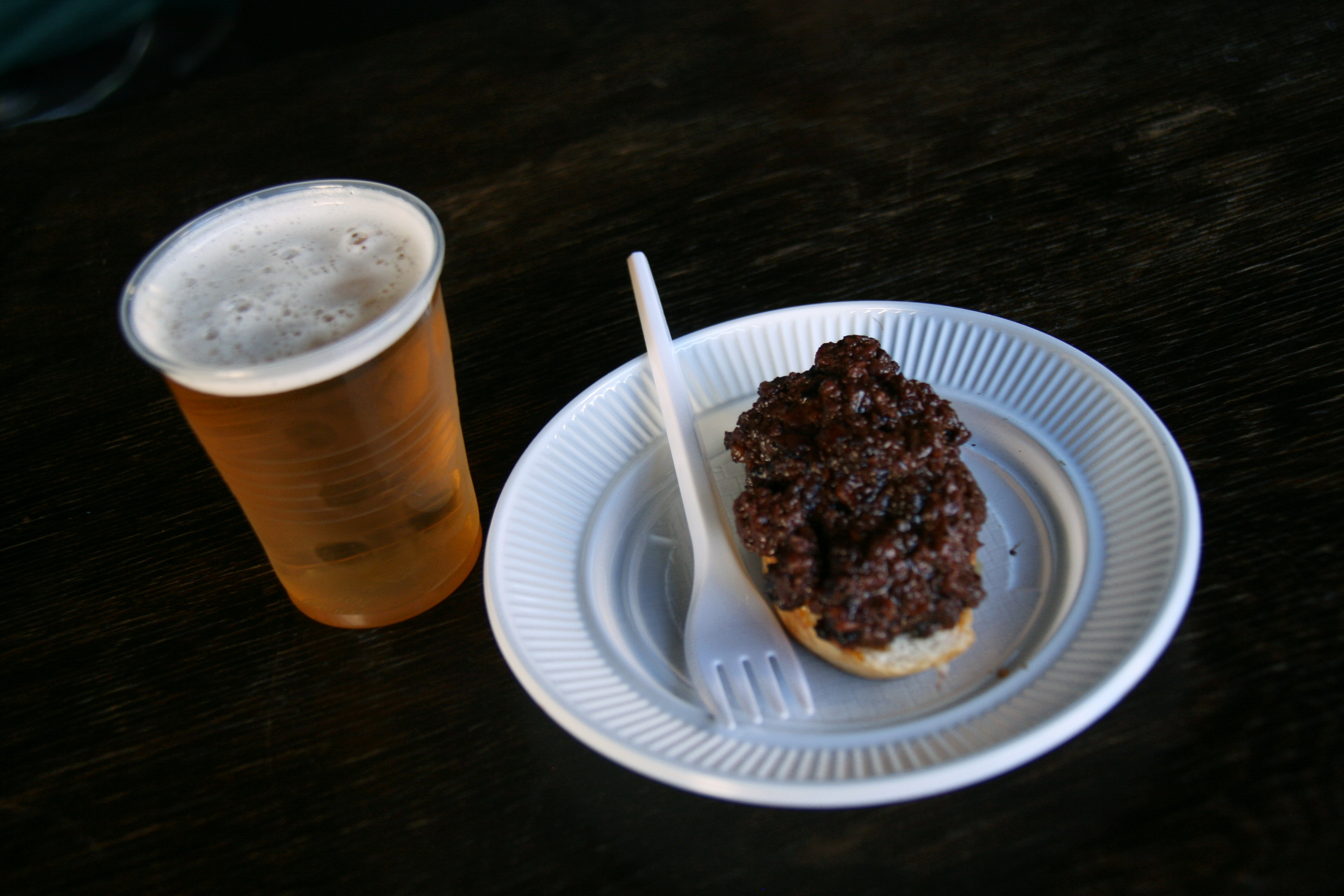 Tapa de la feria en las festividades de San Lorenzo (Valladolid) tapa con morcilla